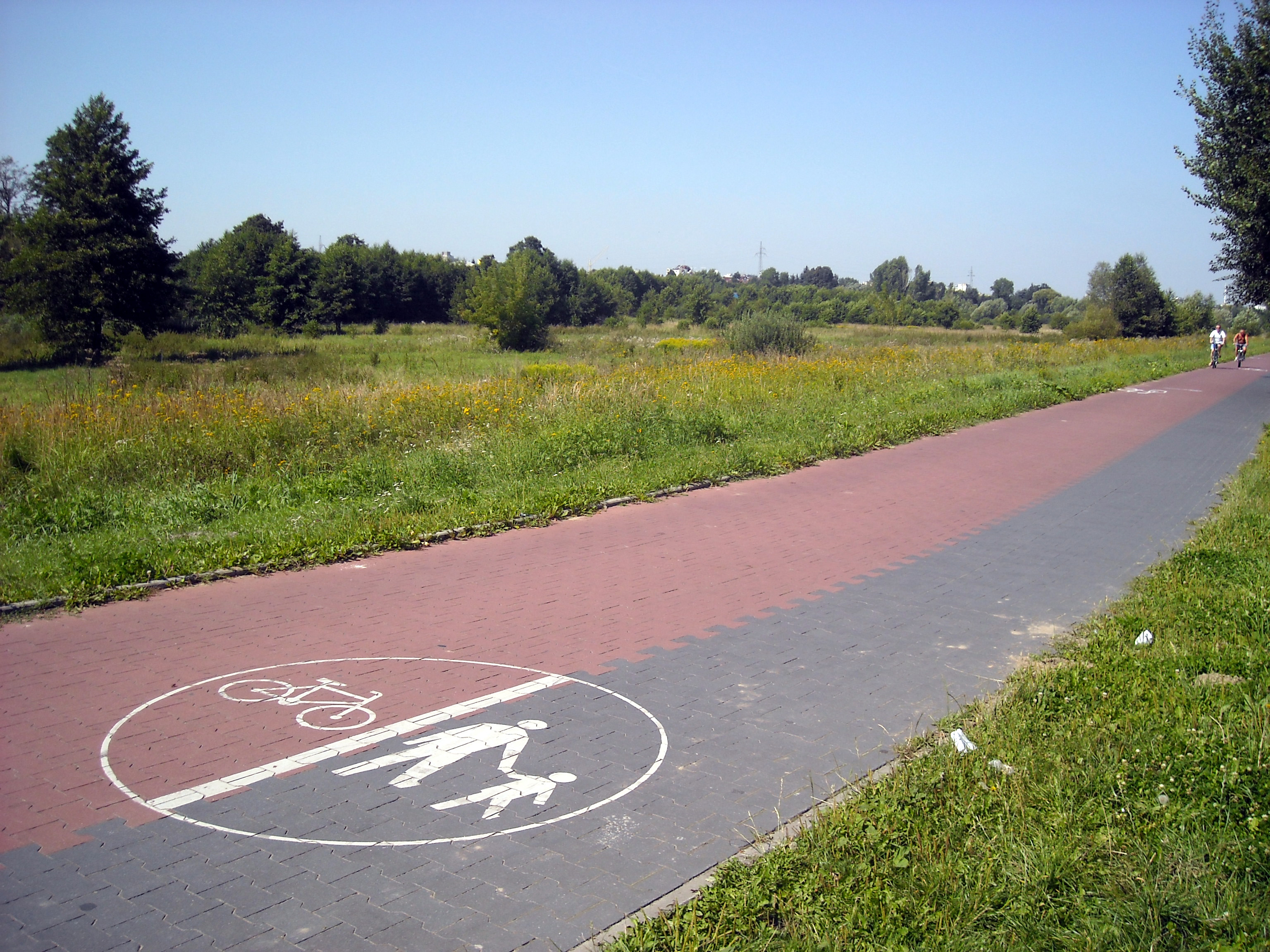 Widok od ul. Romera (a konkretnie z mostu na Bystrzycy) na lubelską ścieżkę rowerową na zachodniej granicy dzielnicy Wrotków z Majdanem Wrotkowskim (w dzielnicy Zemborzyce)